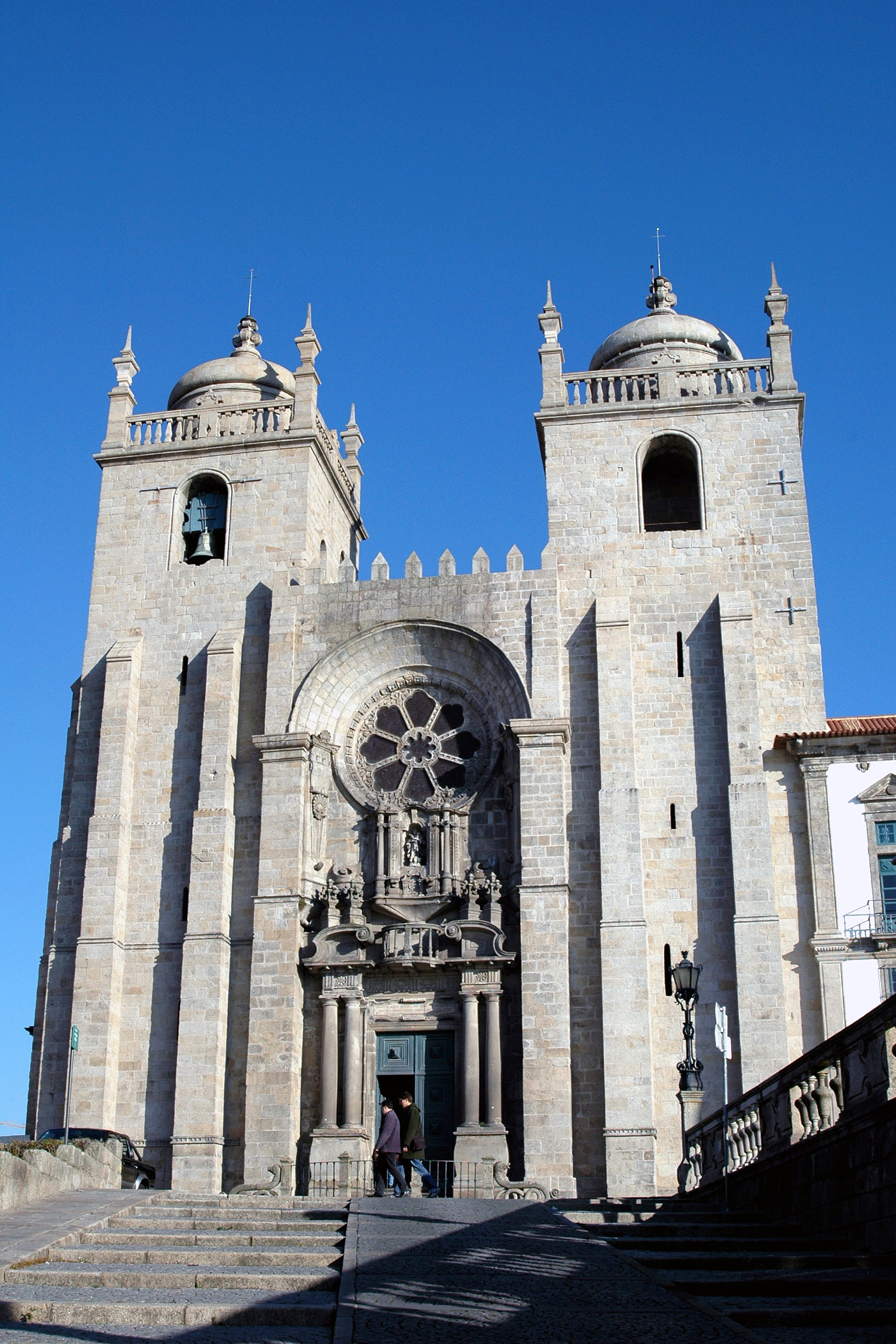 Sé Catedral do Porto ou Sé do Porto This file was uploaded for Wiki Loves Monuments in Portugal with the unique identifier 70397.